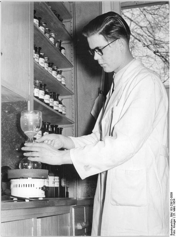 Königs Wusterhausen, Apotheke, Rezepturraum Zentralbild Krueger Wjt-Sta.-Ho. 23 Mot. 25.3.1954 "Märkische Apotheke" Königs Wusterhausen sichert die Versorgung der Landbevölkerung mit Medikamenten und Arzneien Die "Märkische Apotheke" in Königs Wusterhausen ist zu einem wichtigen Bindeglied zwischen Arzt und Patienten geworden. Diese staatlich verwaltete Apotheke gibt durch ihre vorbildlichen Einrichtungen, dem qualifizierten Fachpersonal und der darüber hinaus in den Laboratorien geleisteten wissenschaftlichen Arbeit, dem Arzneimittelempfänger die Gewähr für die Abgabe richtig dosierter Medikamente hochwertiger Qualität. Als Ausbildungsstätte für den Nachwuchs auf dem Gebiet des Apothekenwesens und der Pharmazie ist die "Märkische Apotheke" Königs Wusterhausen, die 1953 ihren Neubau in der Nähe des Bahnknotenpunktes Königs Wusterhausen beziehen konnte, in den Mittelpunkt des Interesses auf dem Gebiete des Gesundheitswesens gerückt. UBz: In der Rezeptur werden Arzneien nach den Anweisungen der behandelnden Ärzte, insbesondere spezielle Dosierungen, hergestellt. Apotheken-Assistent Wolfgang Brandenburg hat sich an der Humboldt-Universität zum Studium beworben. Er will das Examen als Apotheker ablegen, wobei seine in der Praxis erworbenen Kenntnisse aus der "Märkischen Apotheke" nützlich sind. In der Rezeptur arbeitet Assistent Wolfgang Brandenburg an einem Sintrax-Apparat zur Herstellung von Infusen und Dekokten (Aufgüsse und Aufkochungen).